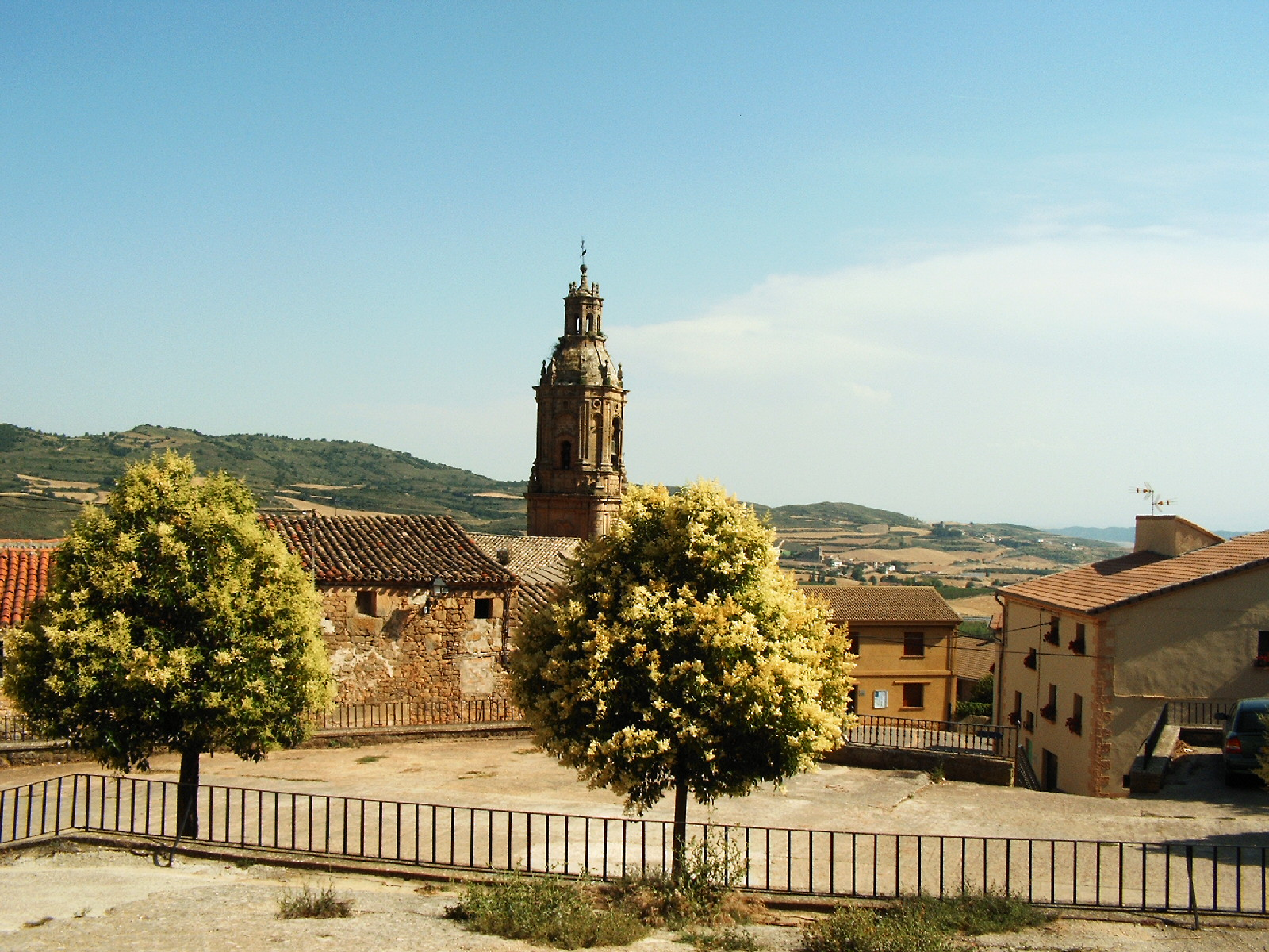 Monjardin